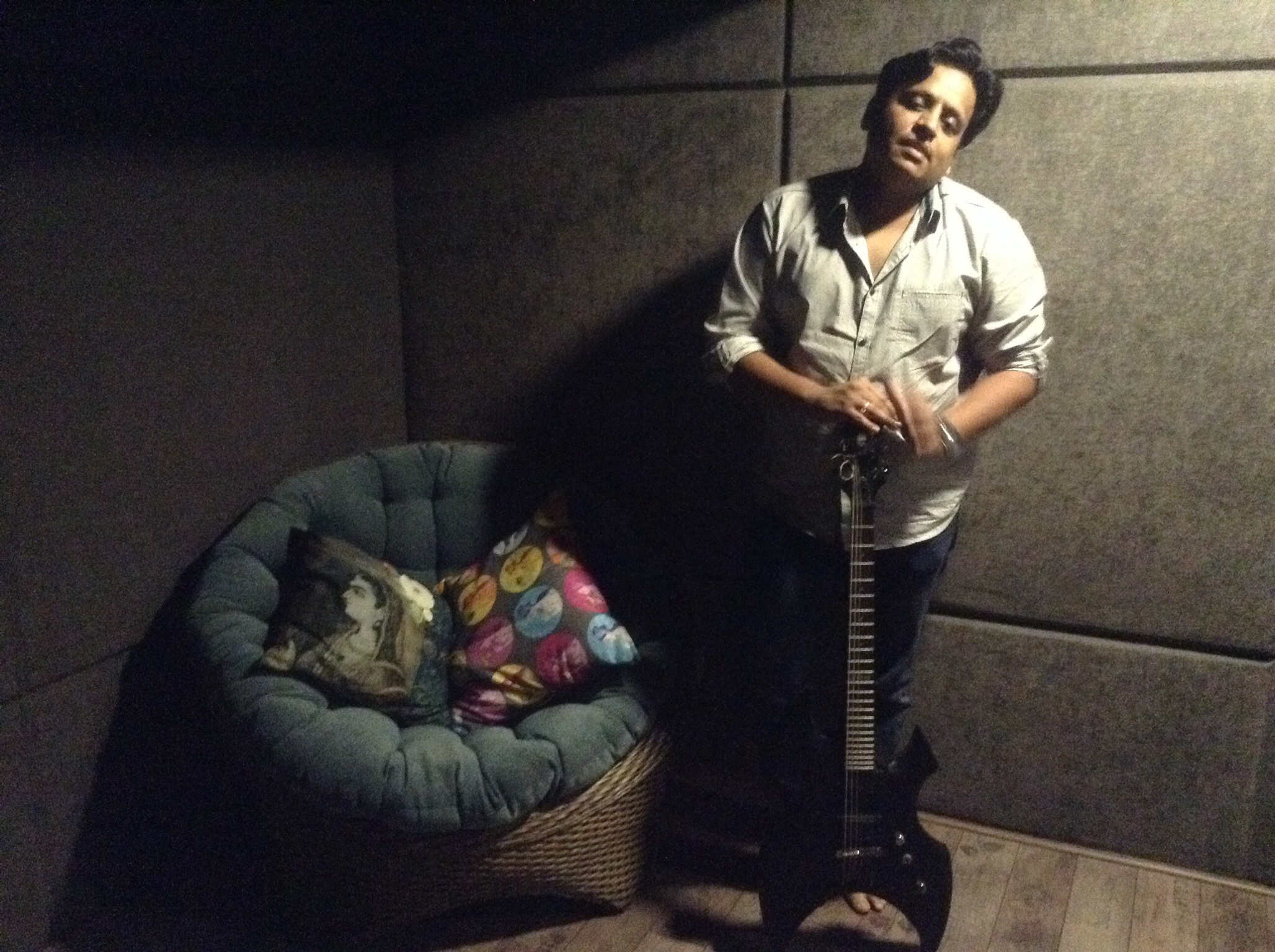 Director prashant raj.